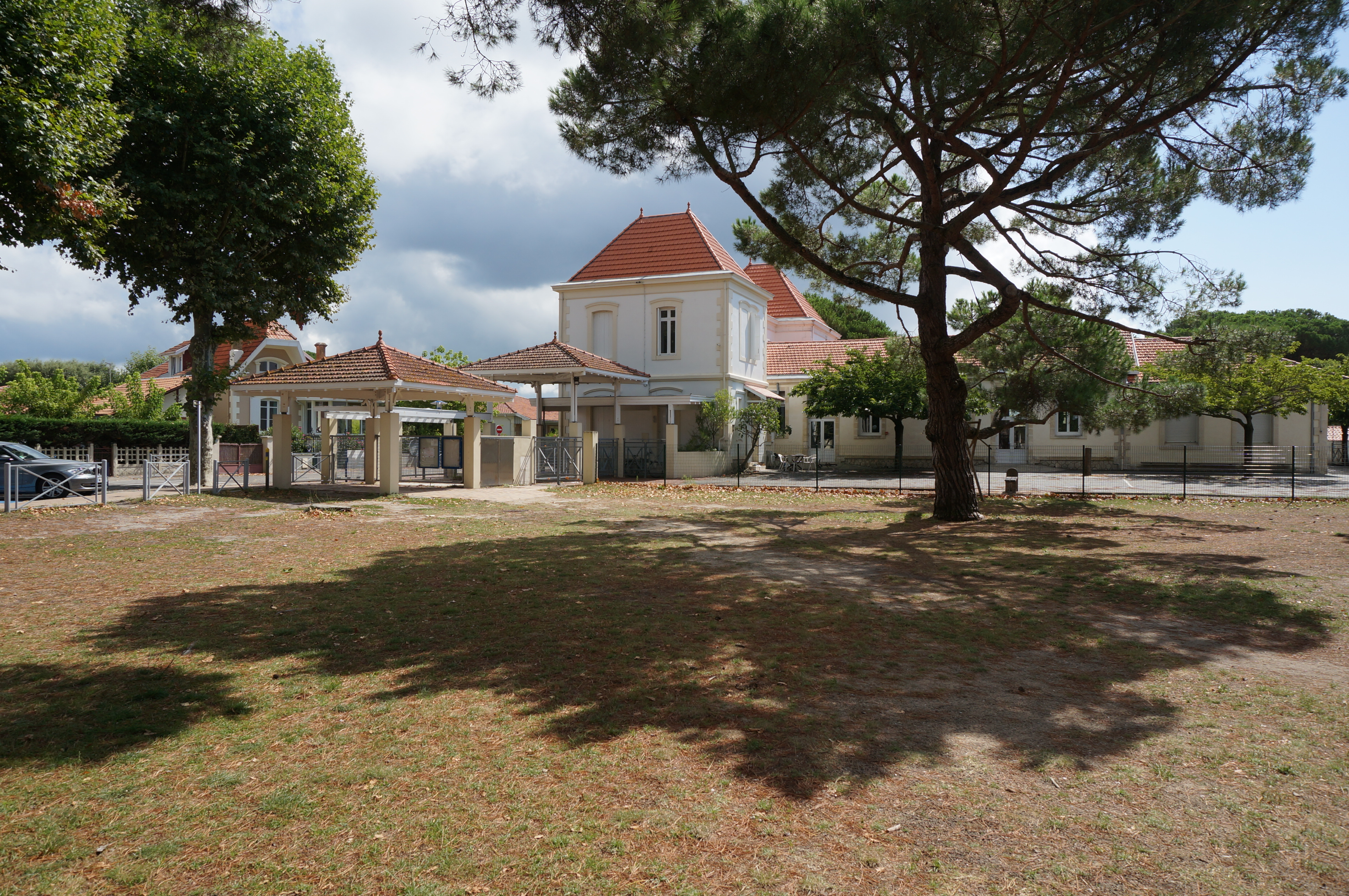 École Jules Ferry d'Andernos-les-Bains (Gironde, France).